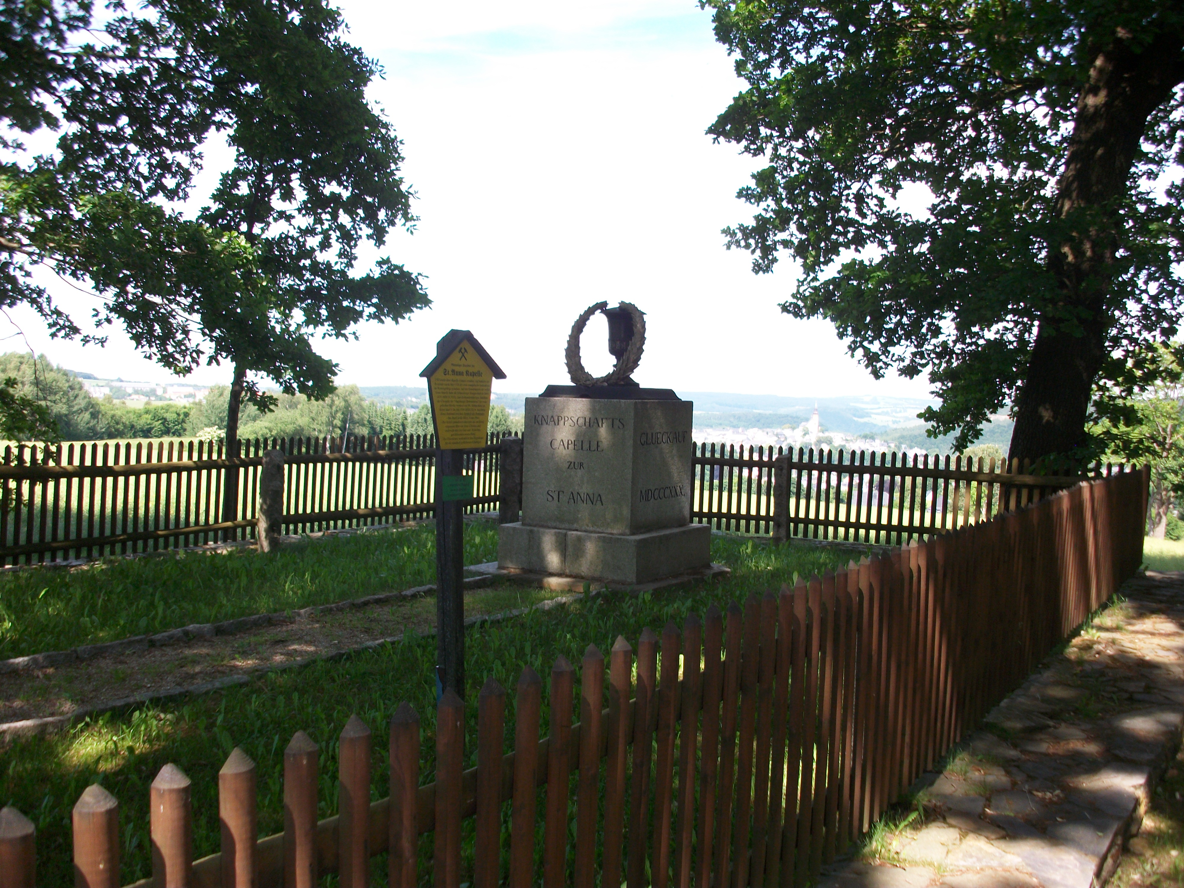 Neustädtel, Denkmal St. Anna (Sommer 2017)